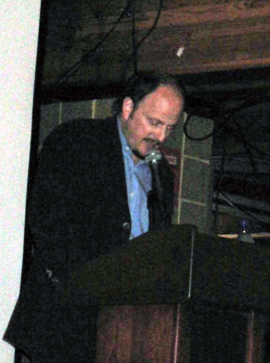 Jeffrey Eugenides